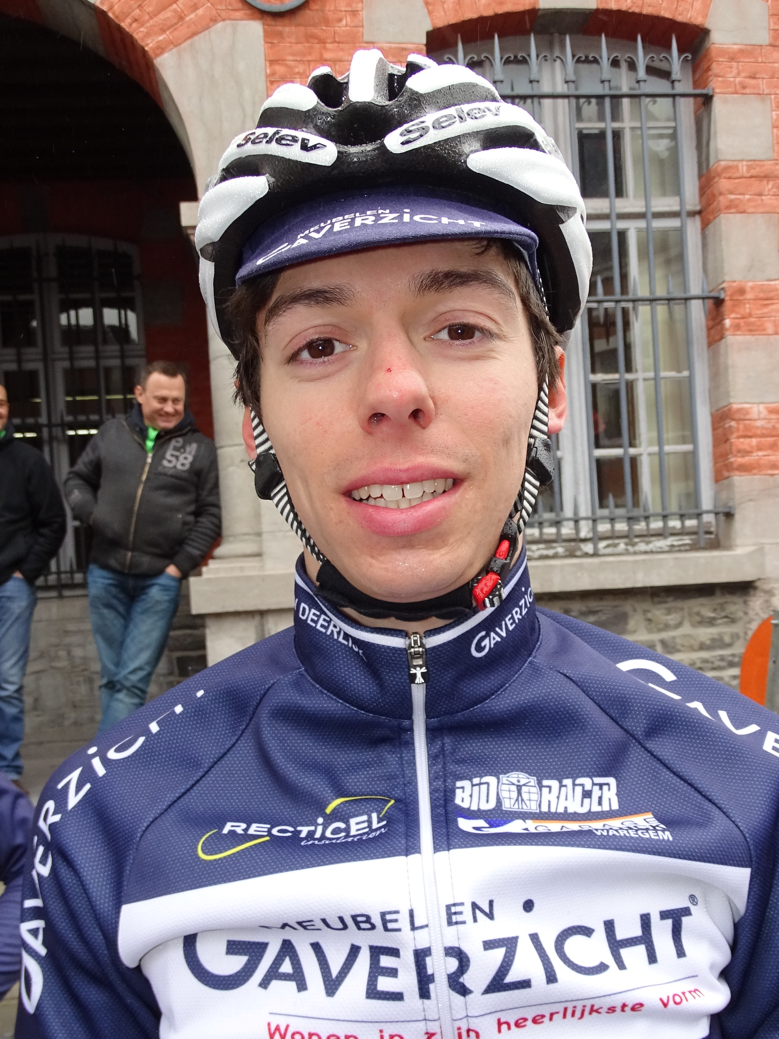 Triptyque des Monts et Châteaux 2015 Depicted person: Gianni Marchand Depicted team: KSV Deerlijk-Gaverzicht